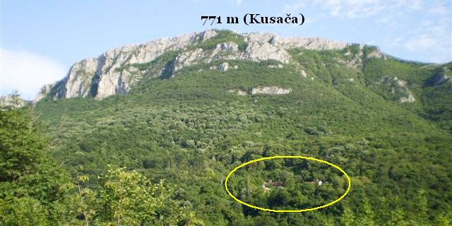 Srpski (latinica): Mikrolokacija Manstira Sićevo